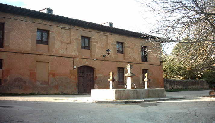 Plaza de Pozancos